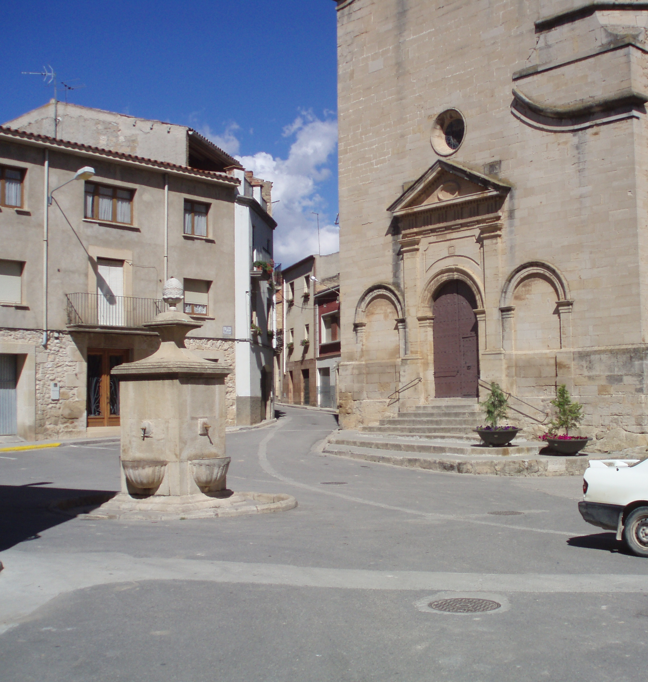 Plaça Major de Cervià de les Garrigues, amb l'església de Sant Miquel